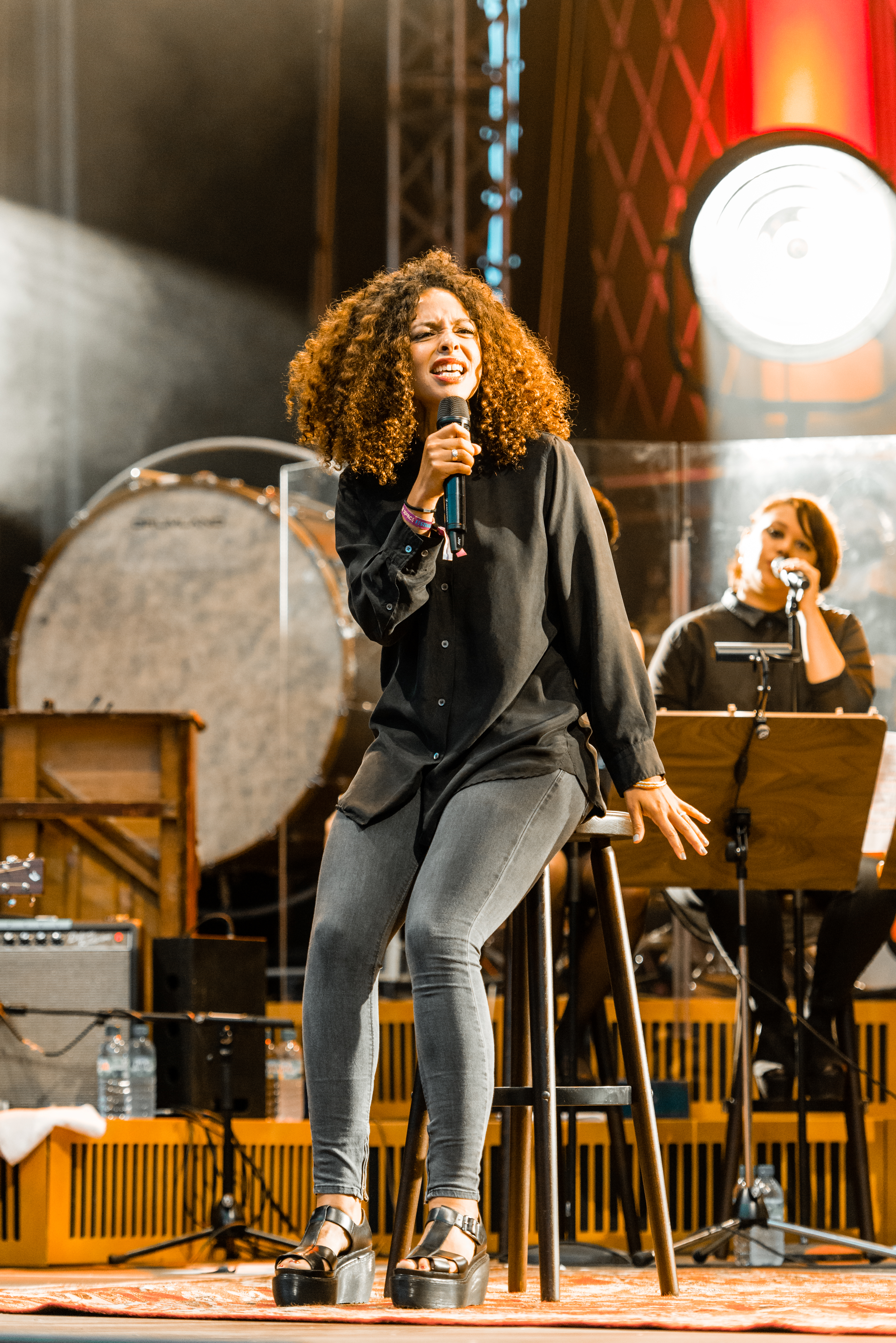 'Open Source Festival 2014 - Düsseldorf': 'Max Herre & Kahedi Radio Orchestra MTV Unplugged feat Joy Denalane, Afrob, Megaloh...'